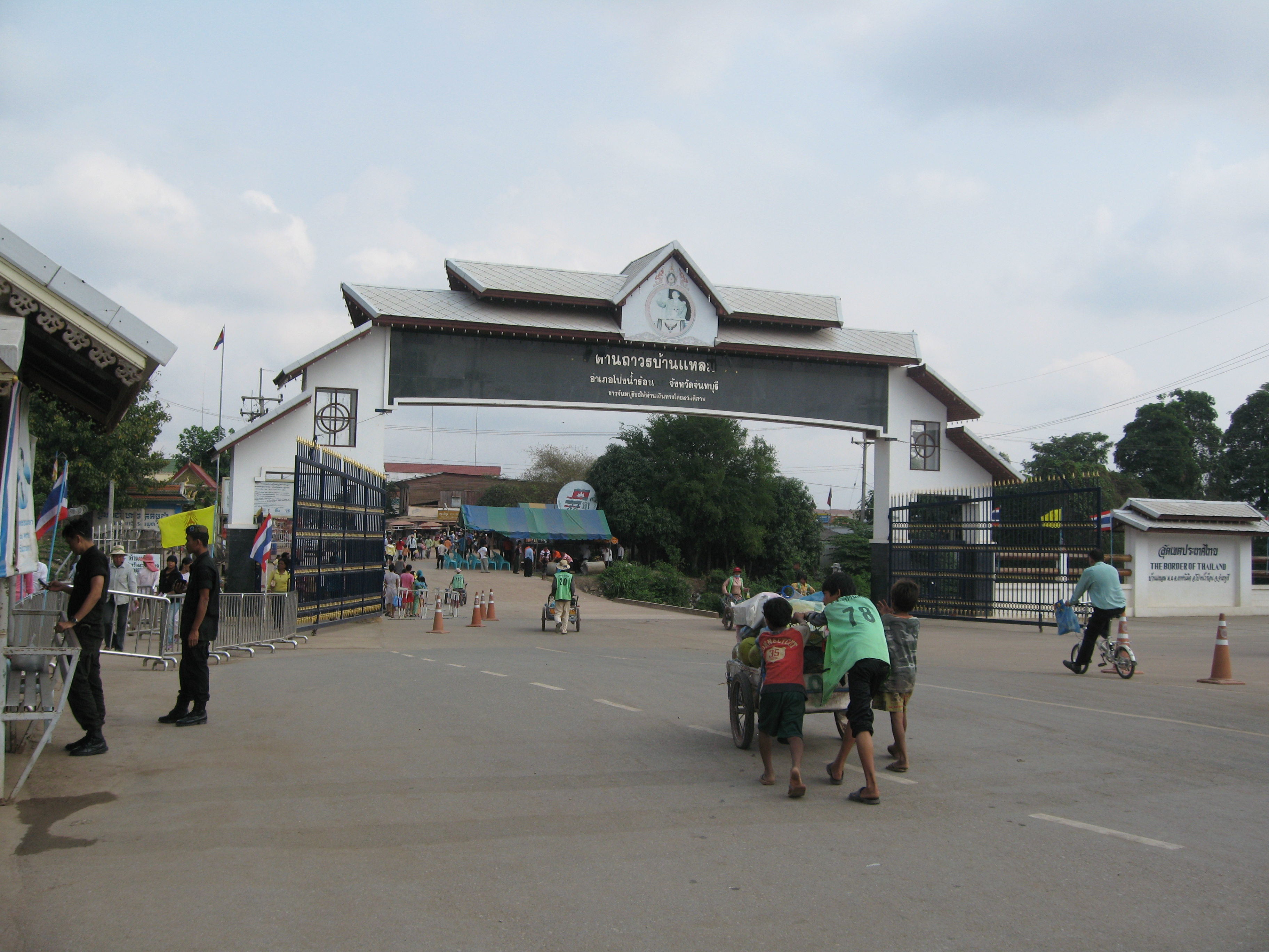 BAN LAEM GRENZE KAREN TRANSPORT GRENZE BAN LAEM THAILAND KAMRIENG CAMBODIA 18 FEBRUAR 2010 KAI